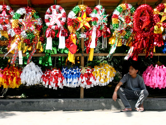 A Filipino vendor selling Parols.